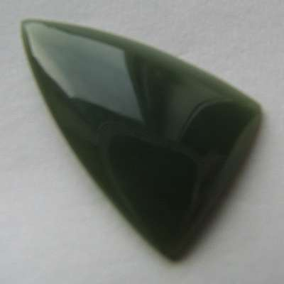 Wyoming nephrite jade